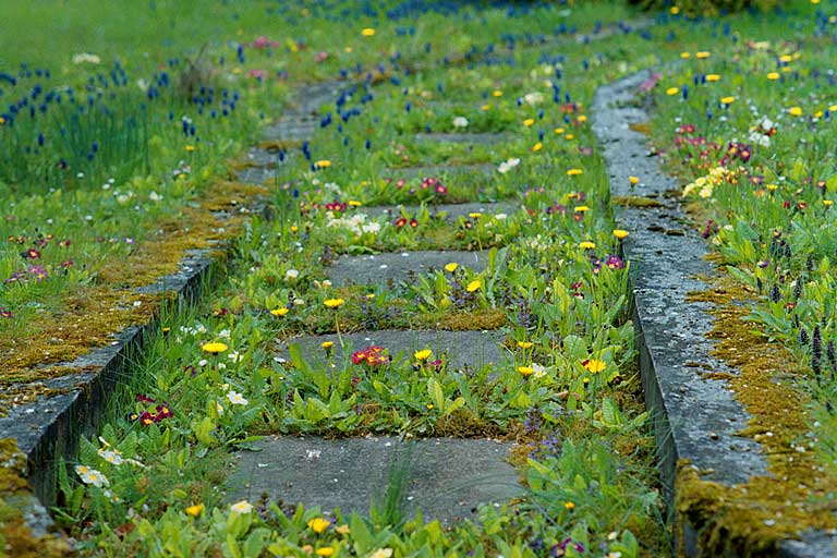 „Blumenweg“ mit Primeln in Kaiserslautern, Deutschland